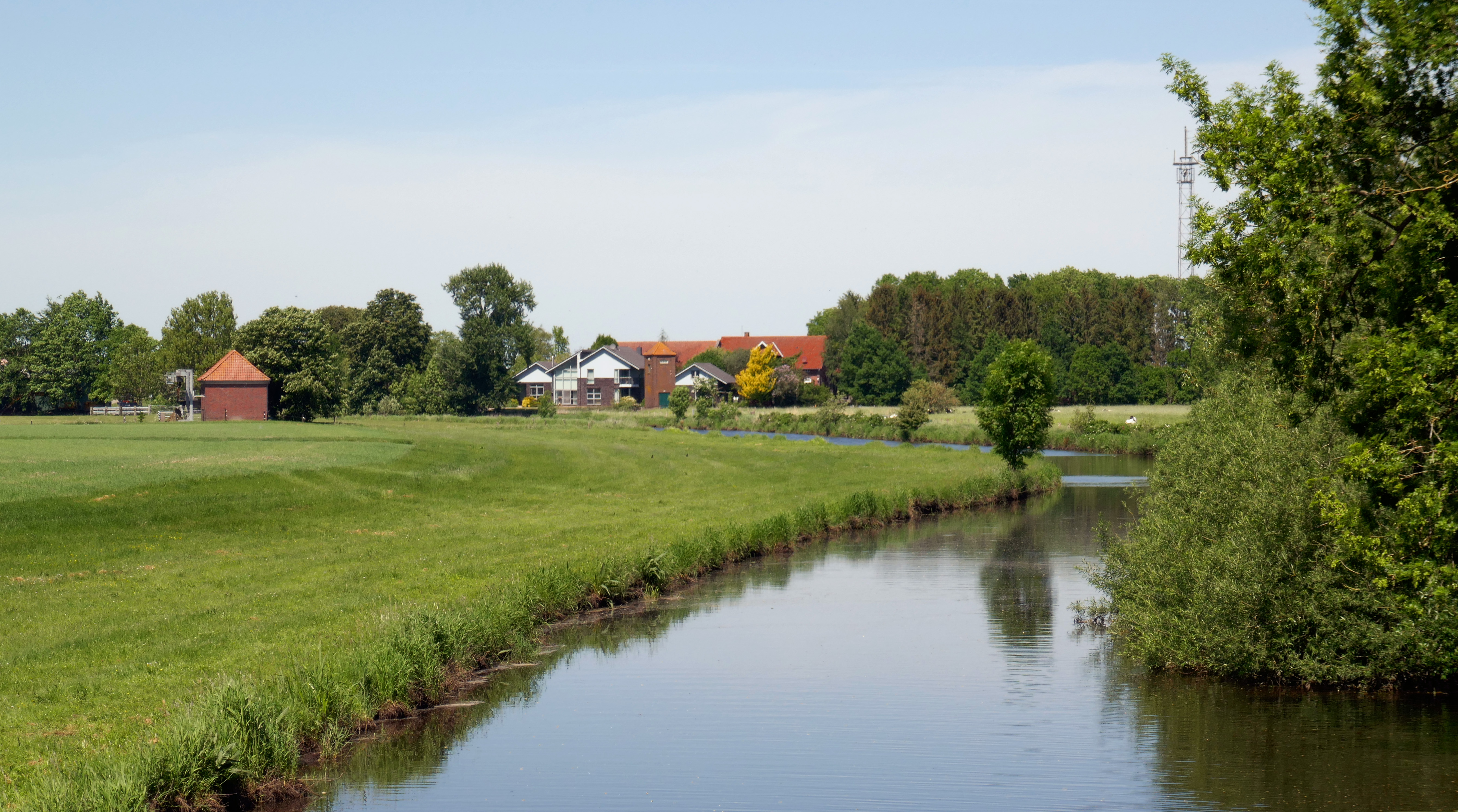 Die Jade in Höhe der Trinitatiskirche in der Ortschaft Jade